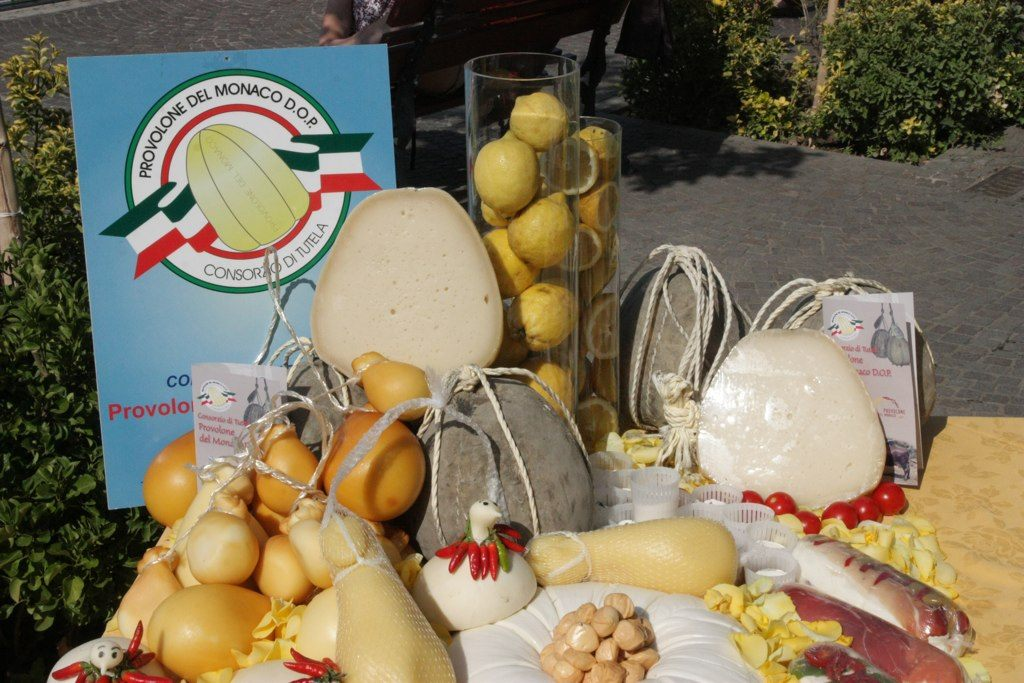 Provolone del monaco e latticini del caseificio Apreda di Sorrento, provincia di Napoli, Italia.